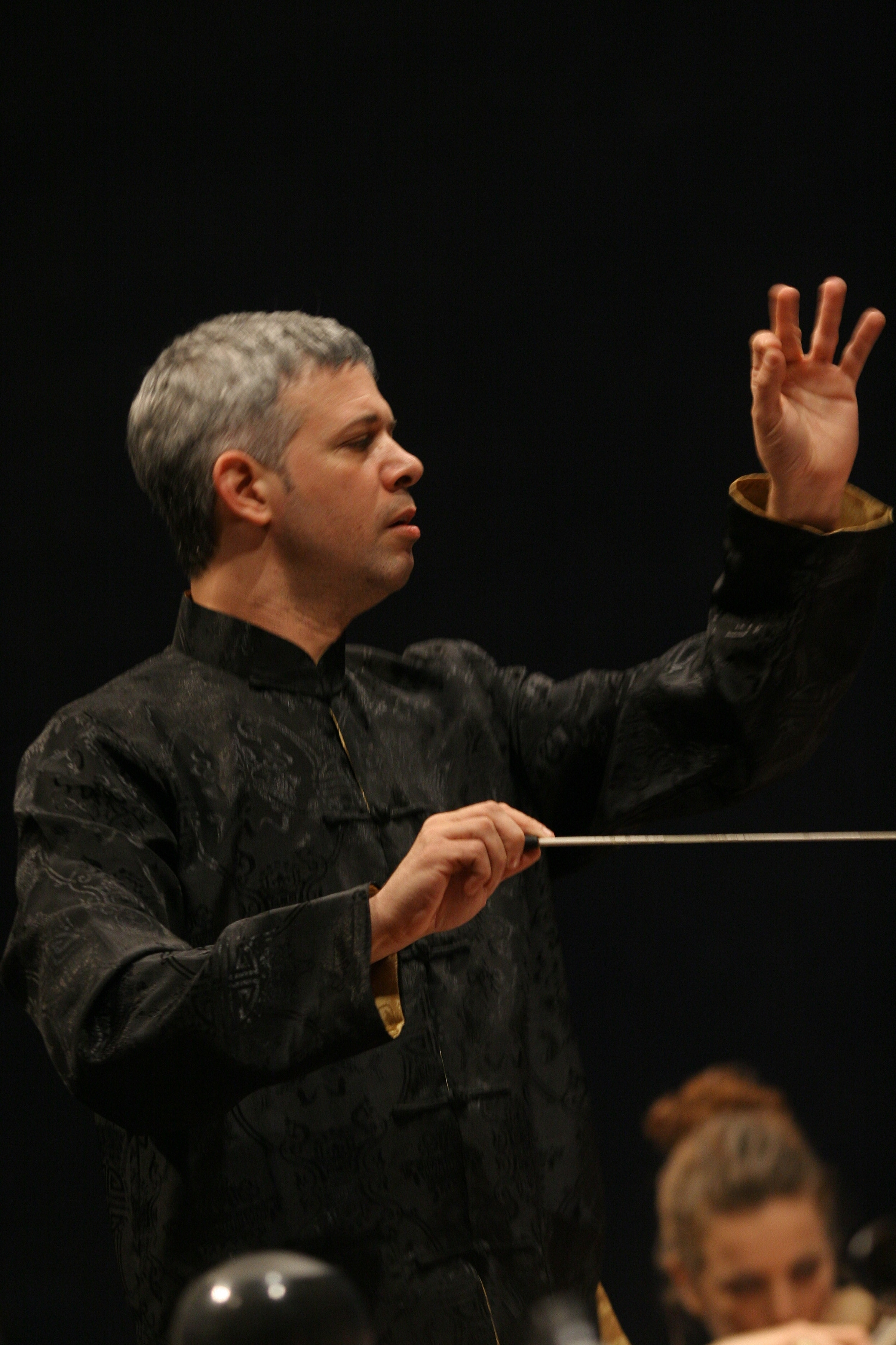 שלום רב, אני מאשר שימוש בתמונה זו לצורך כתיבת ערך על שמי בויקיפדיה תודה, ירון גוטפריד